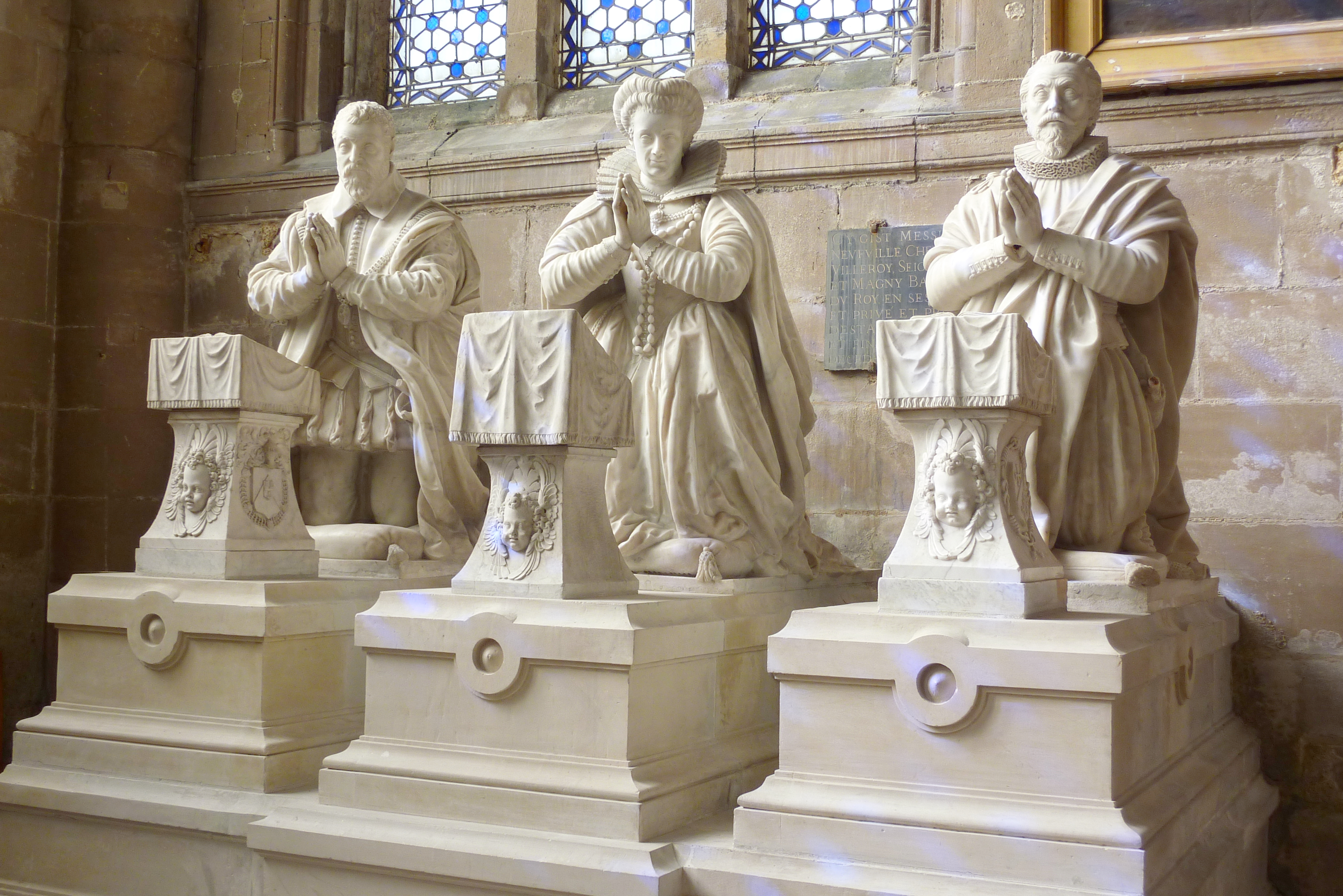 Mausoleum in der Kirche Notre-Dame-de-la-Nativité in Magny-en-Vexin